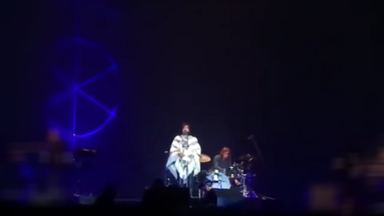 León Larregui hablando sobre el caso de Ayotzinapa en el concierto del Foro Sol